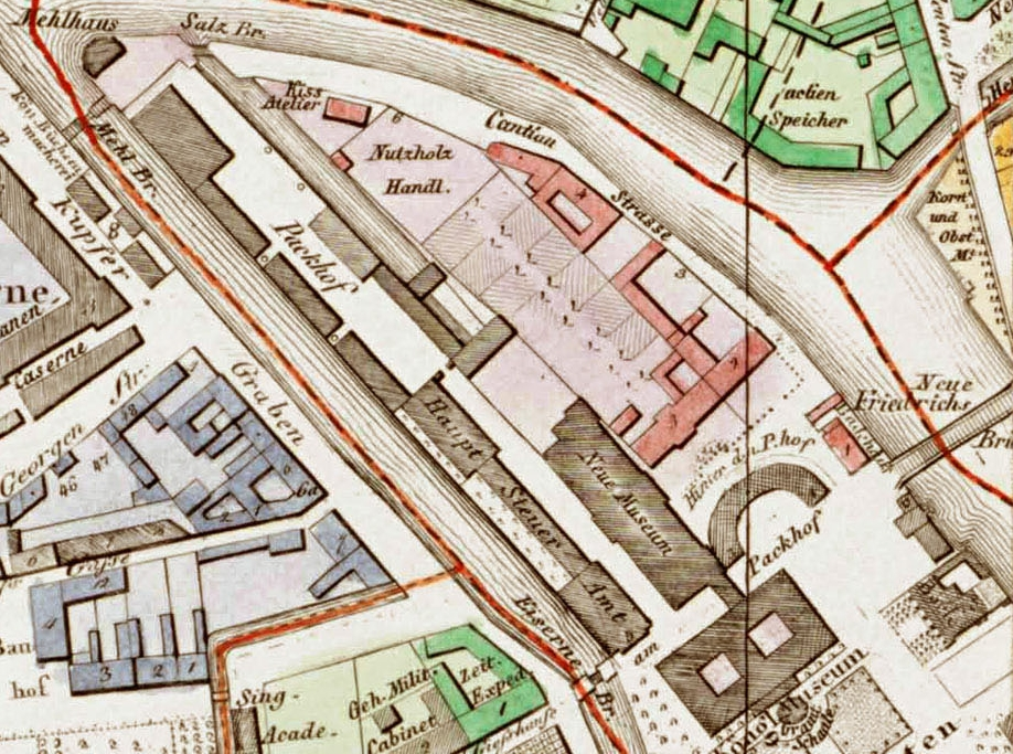 Situationsplan des Neuen Packhofs in Berlin, 1846.